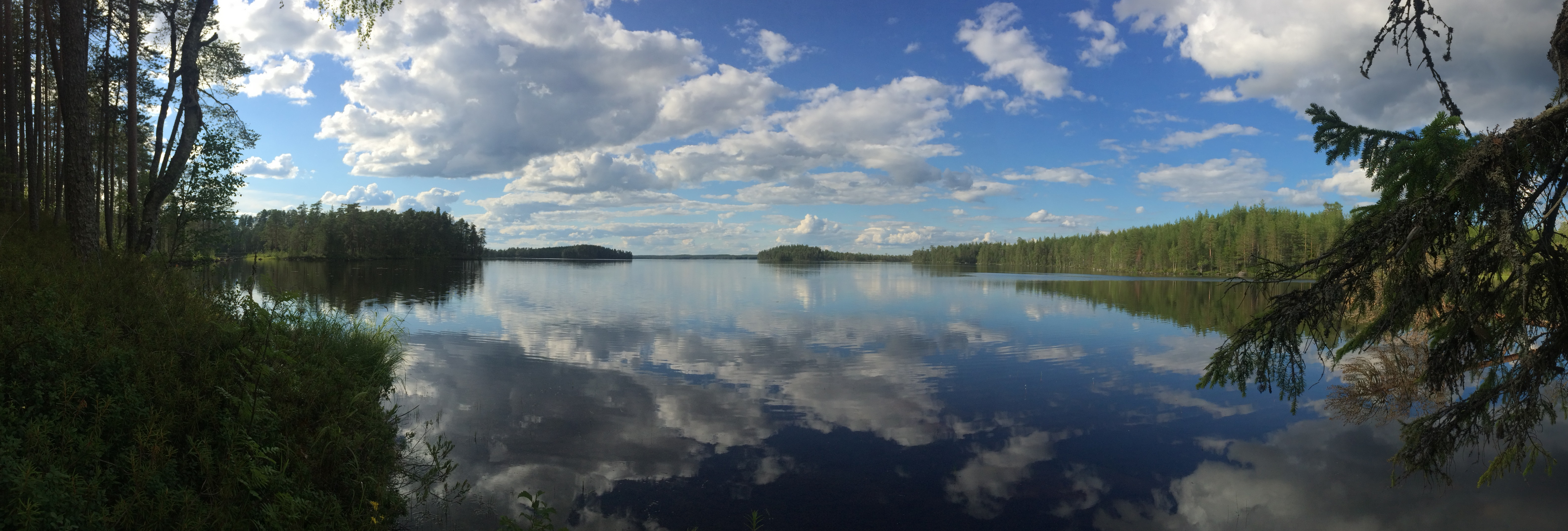 Арянукс (озеро)